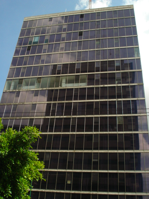 Torre S.R.E en San Luis Potosi Mexico.